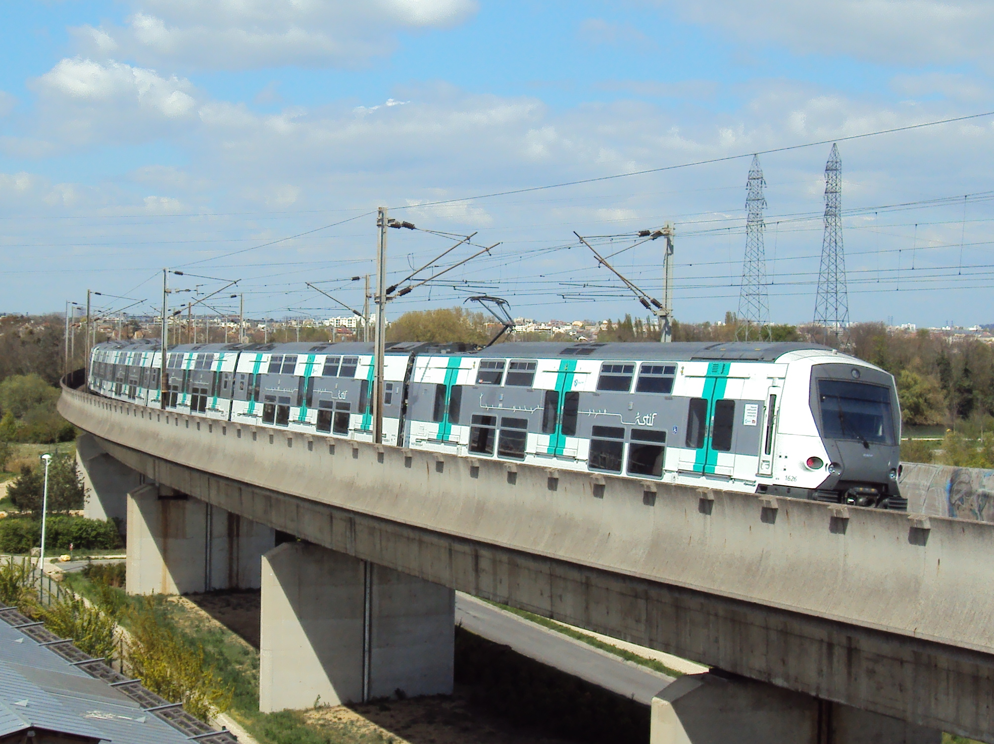 Un MI 09 sur le viaduc de Nanterre (crop)